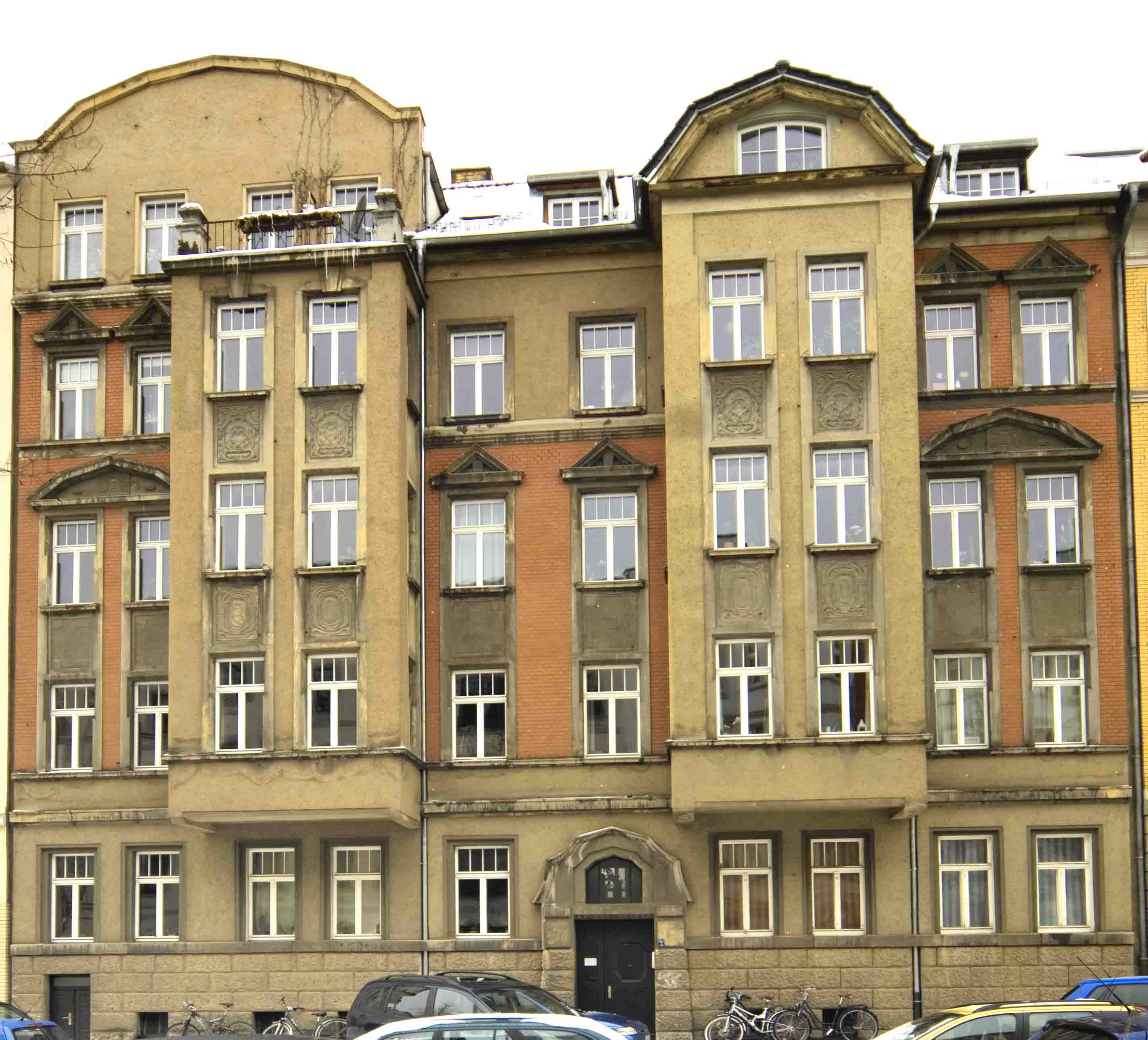 Wohnhaus Horst Karl Hessel in Leipzig, Brockhausstraße 40, von 1946 bis 2006